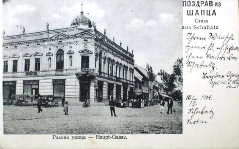 Srpski (latinica): Palata Krsmanovića, 1904, Šabac